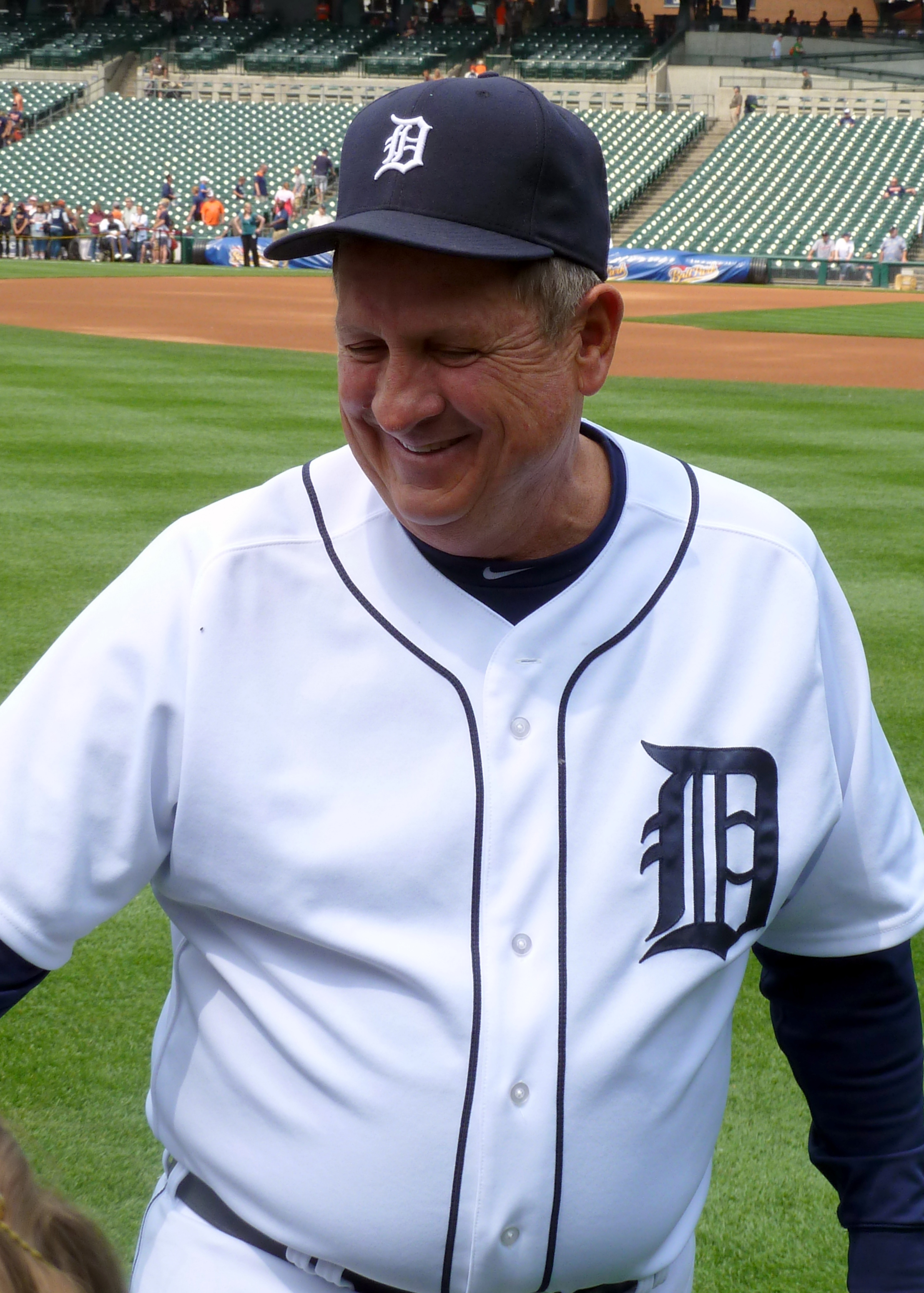 Gene Lamont, 2013 Detroit Tigers